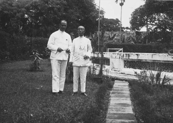 Foto. Khouw Kim An, Majoor der Chinezen van Batavia met een Europese gast